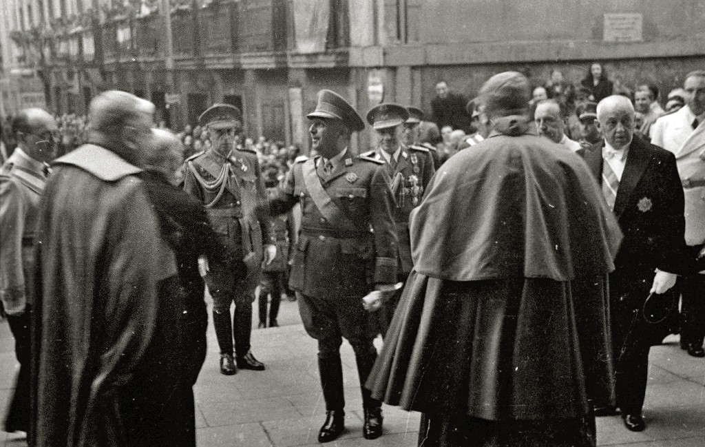 Título original: Francisco Franco en la iglesia de Santa María durante la celebración de la Salve (5/9) Localización: San Sebastián (Guipúzcoa)